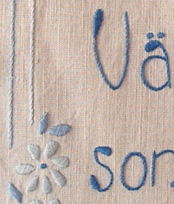 Detalj av väggbonad i stjälk- och plattsöm på uppritat linnetyg.